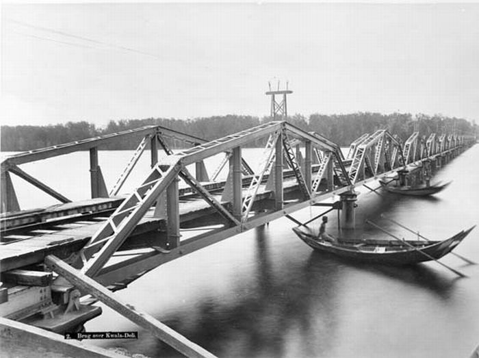 Foto. De grote boogspoorbrug over de Deli-rivier nabij Belawan